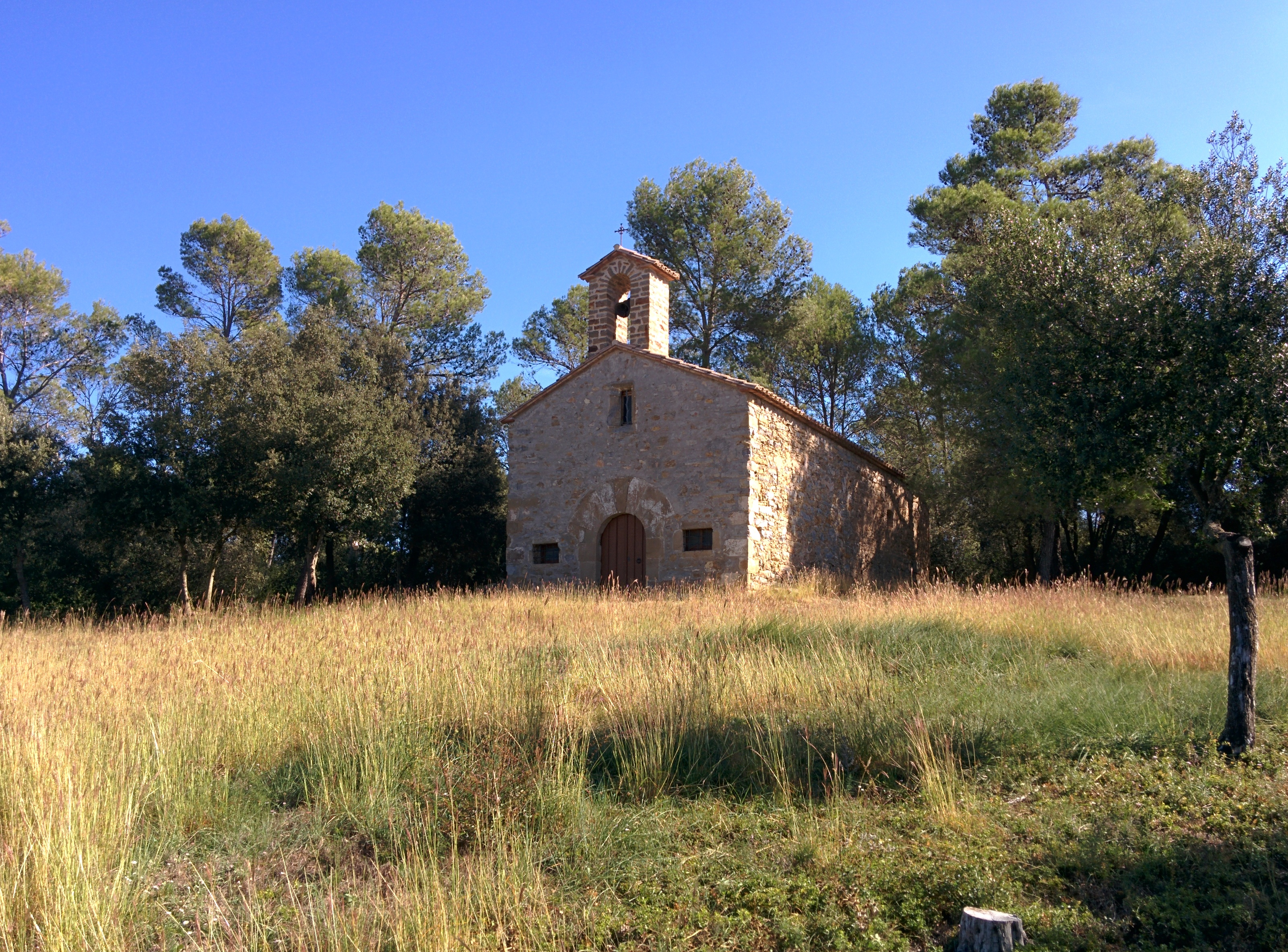 Ermita de Sant Roc (Vilopriu)